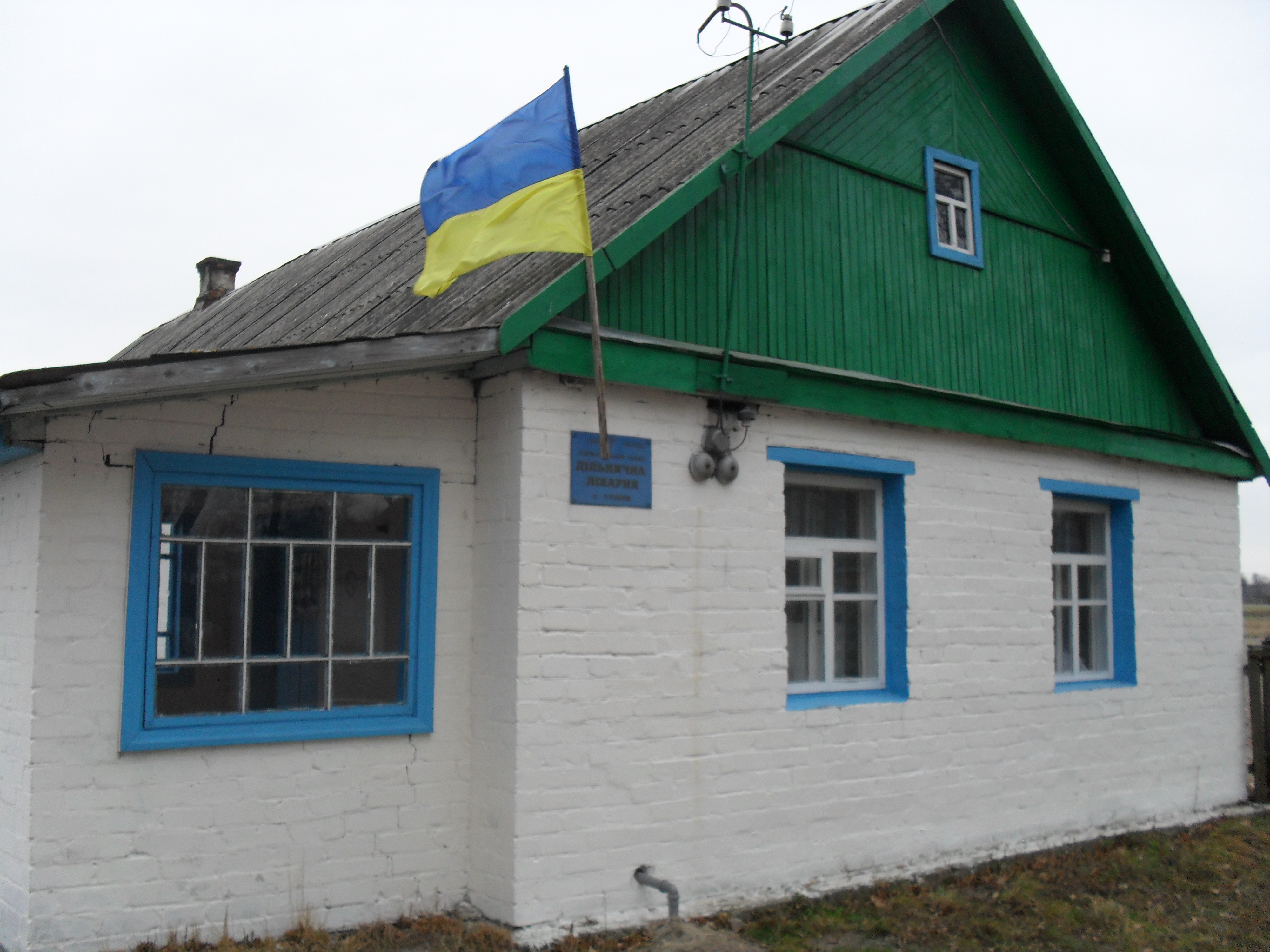 Дільнича лікарня в с. Сушки